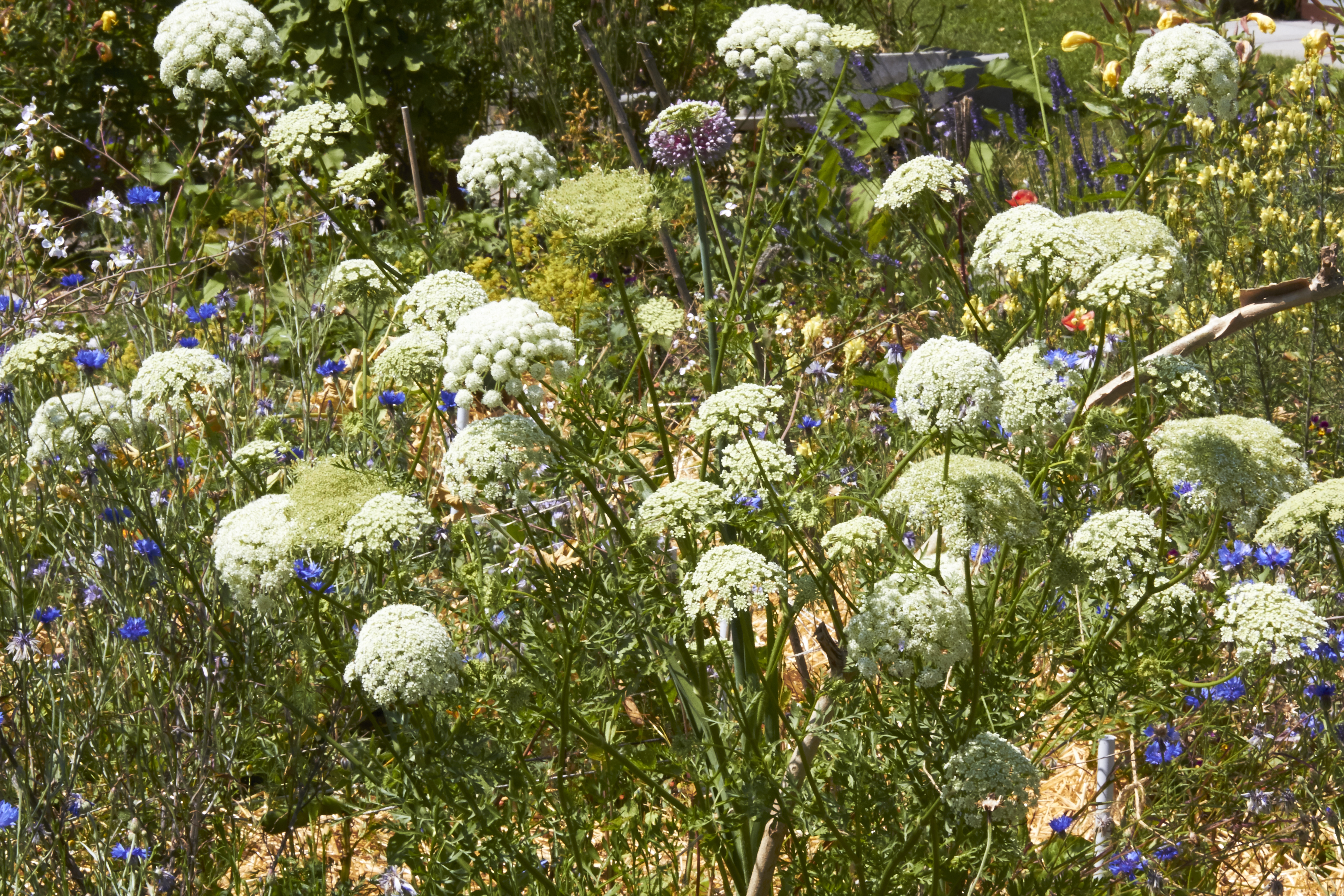 Der vielfach verzweigte Blütenstand einer einzigen Möhre/Karotte.